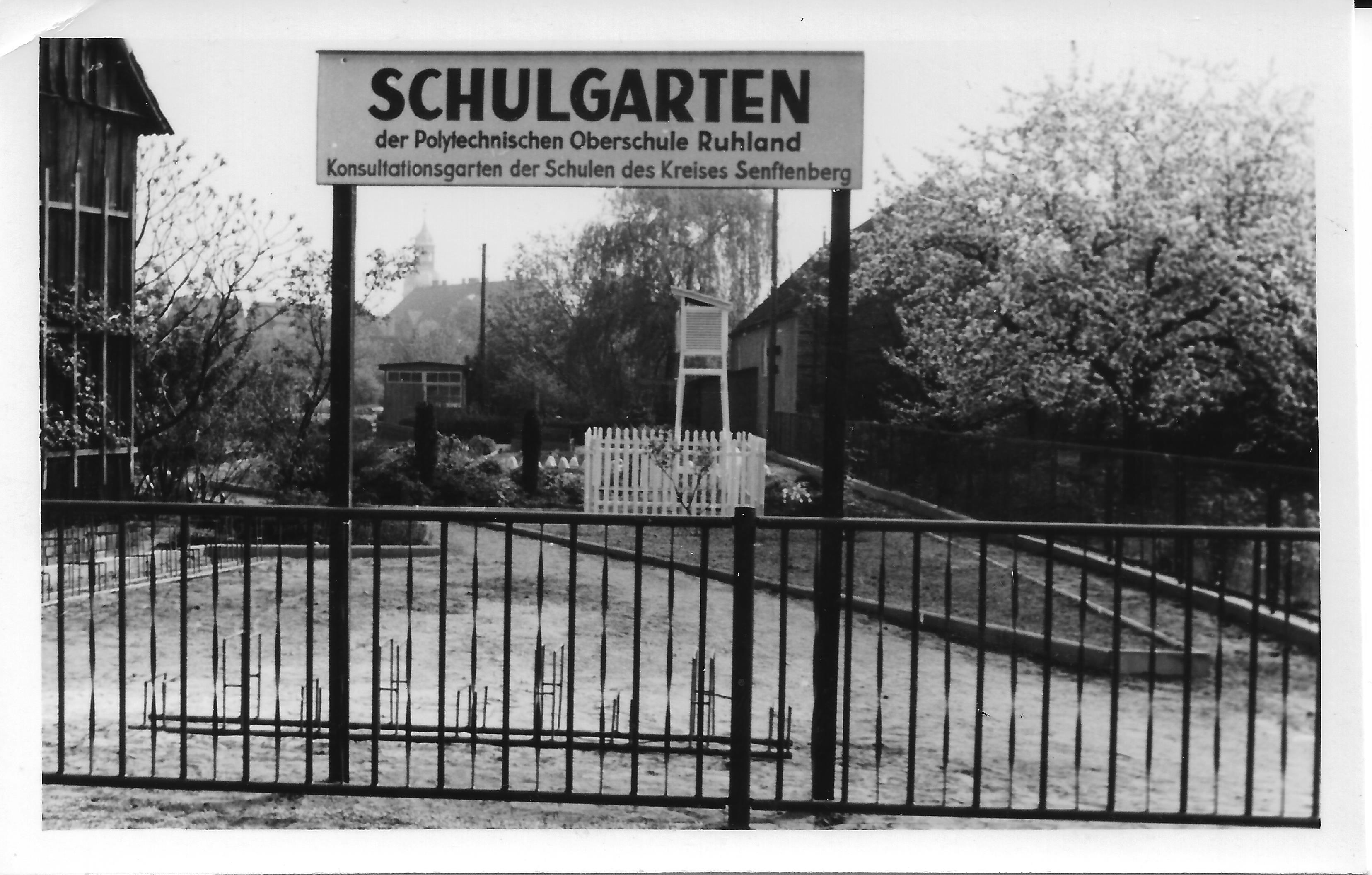 Schulgarten der Geschwister-Scholl-Schule Ruhland, Hartwigstraße, Mai 1977; Eingang